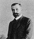 Karol Kozłowski